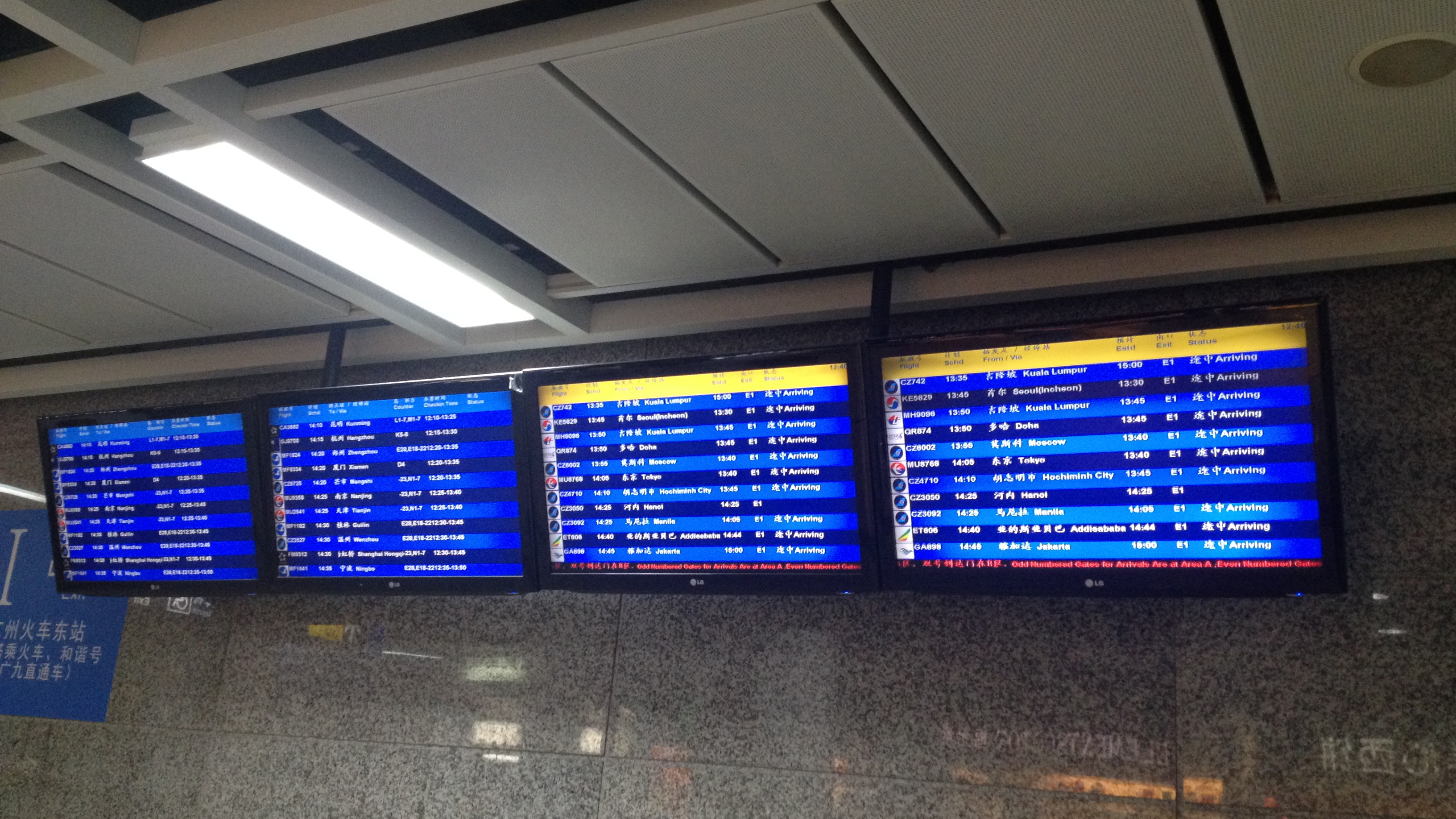 位于地铁广州东站南站厅的白云机场航班信息